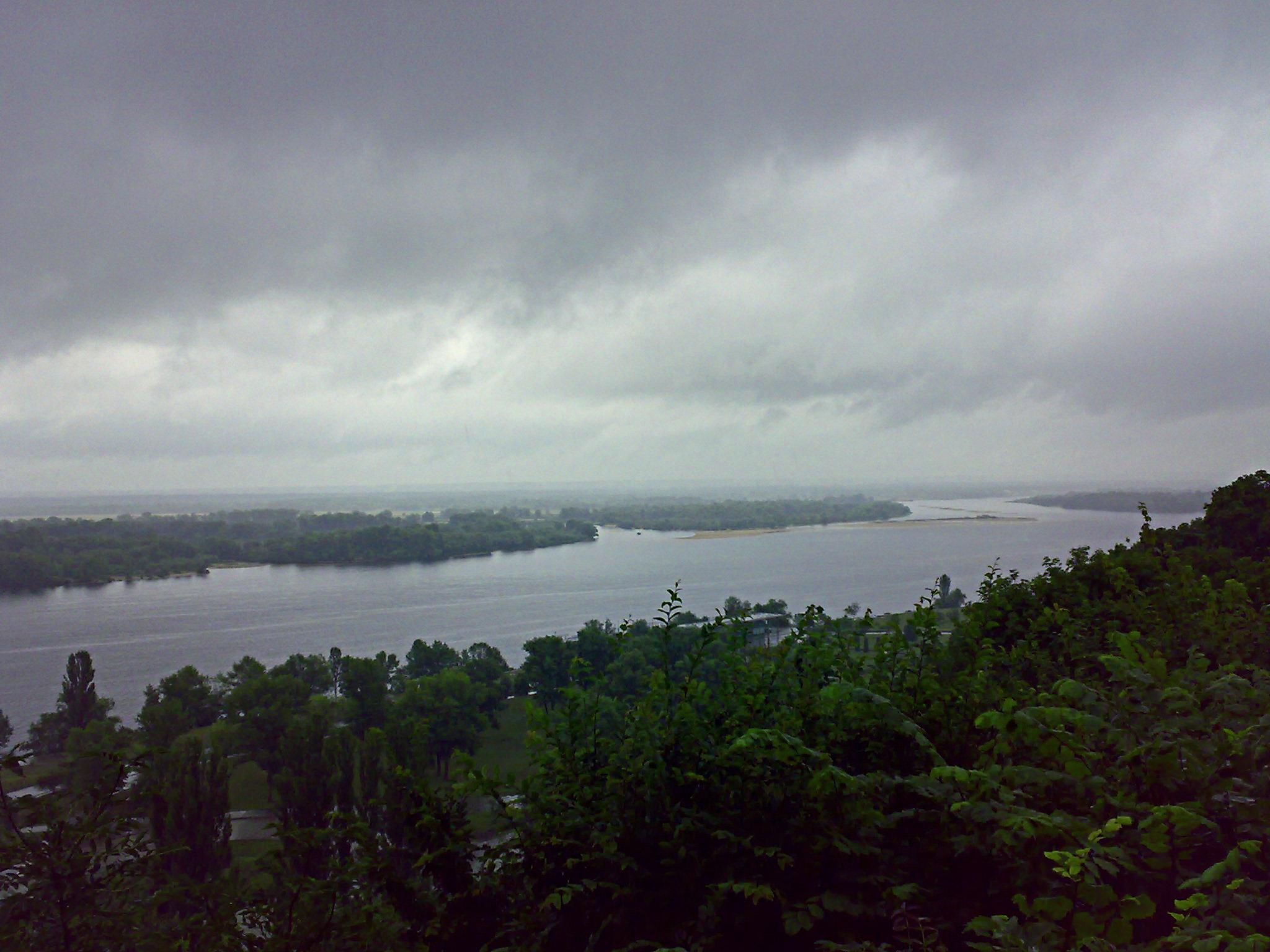 Реве та стогне Дніпр широкий...